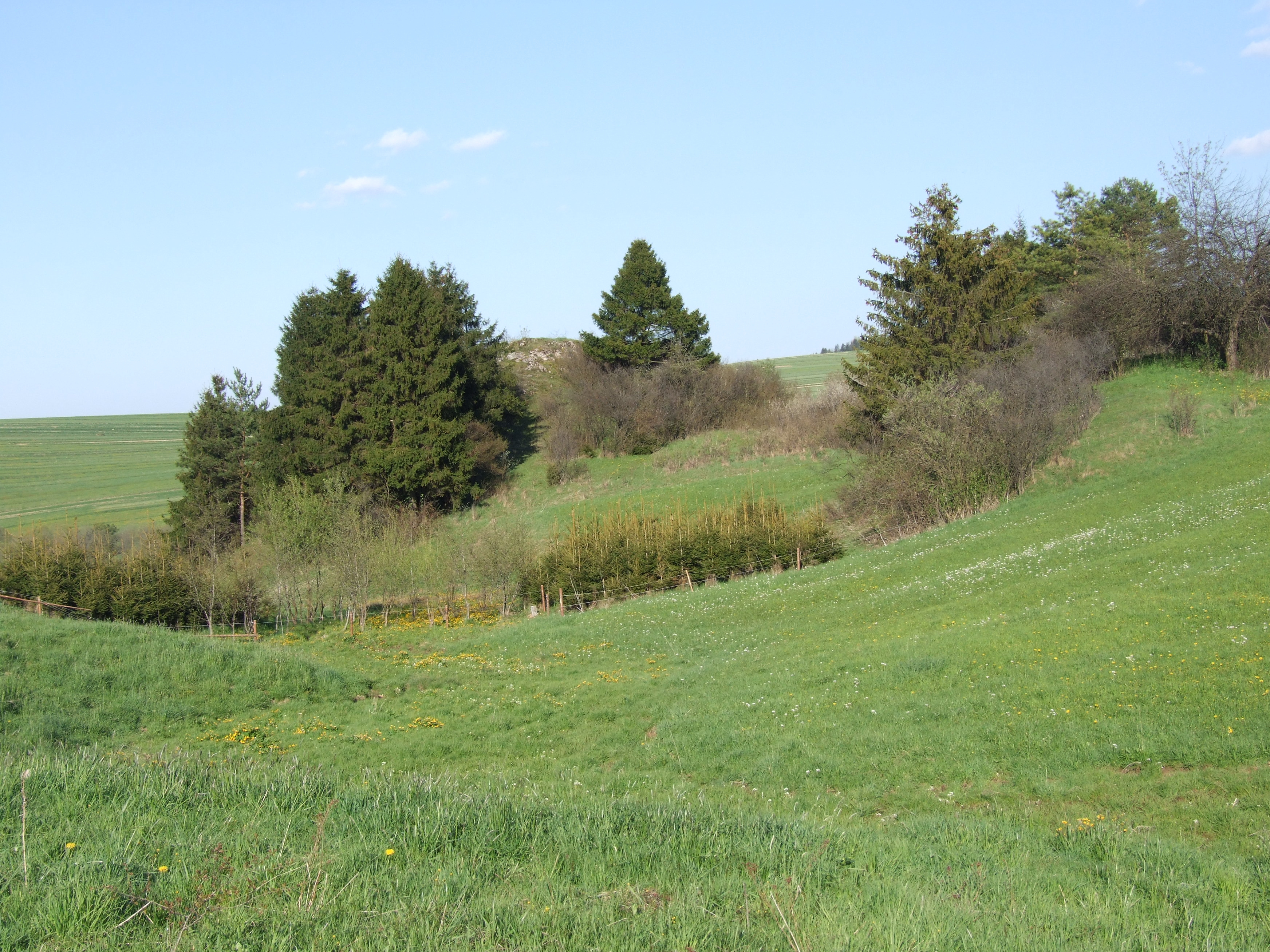 Rafaczowe Skałki. Widok od południowo-zachodniej strony